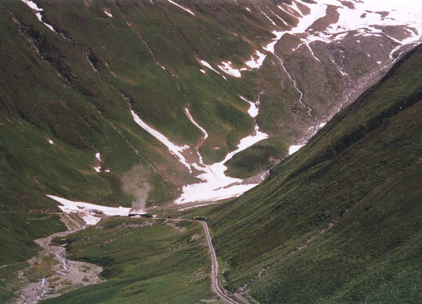 Stoomtrein bij station Muttbach aan het begin van de Furka Scheiteltunnel. Foto zomer 2001, Angélique Leunissen